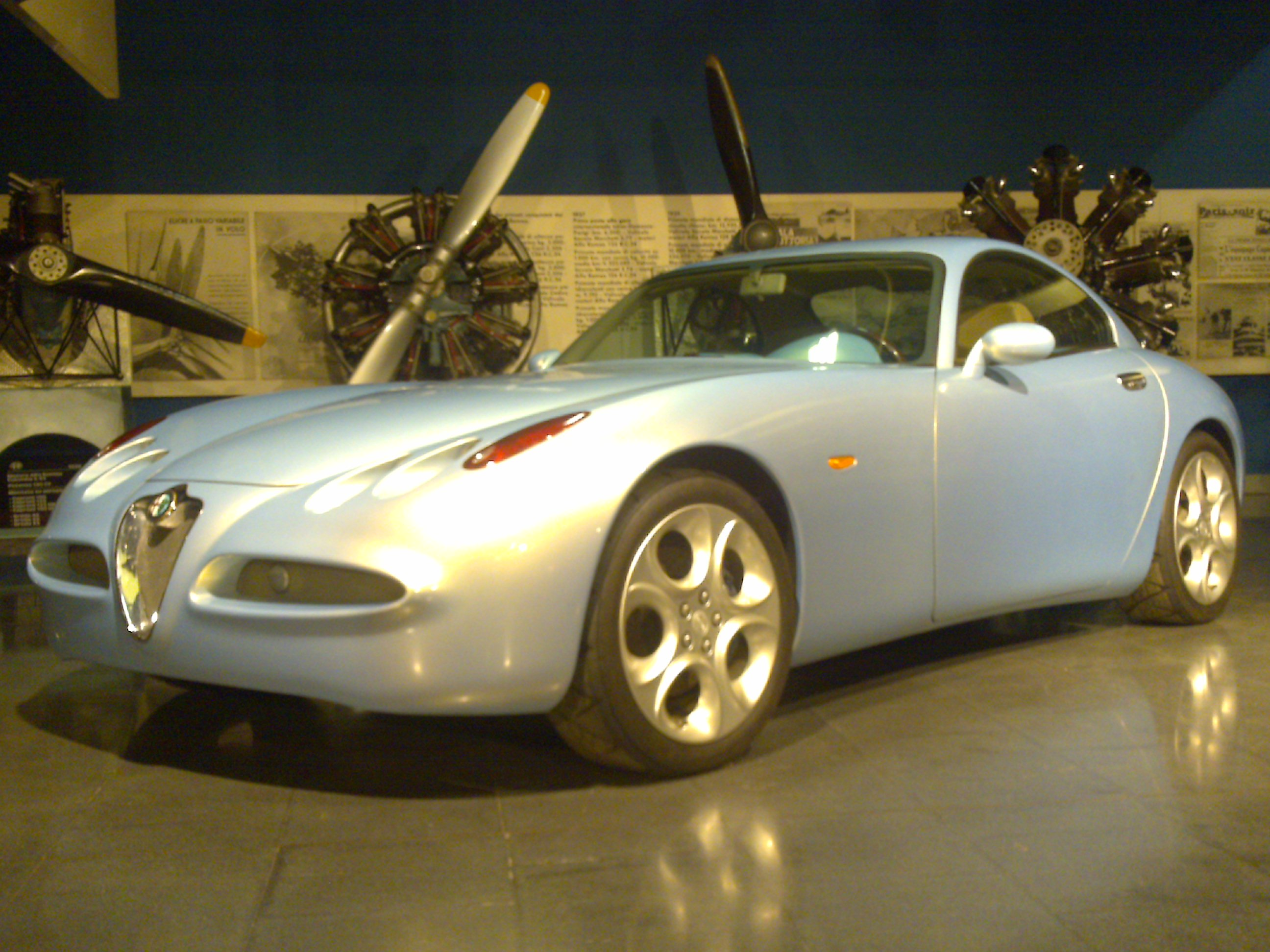 Alfa Romeo concept